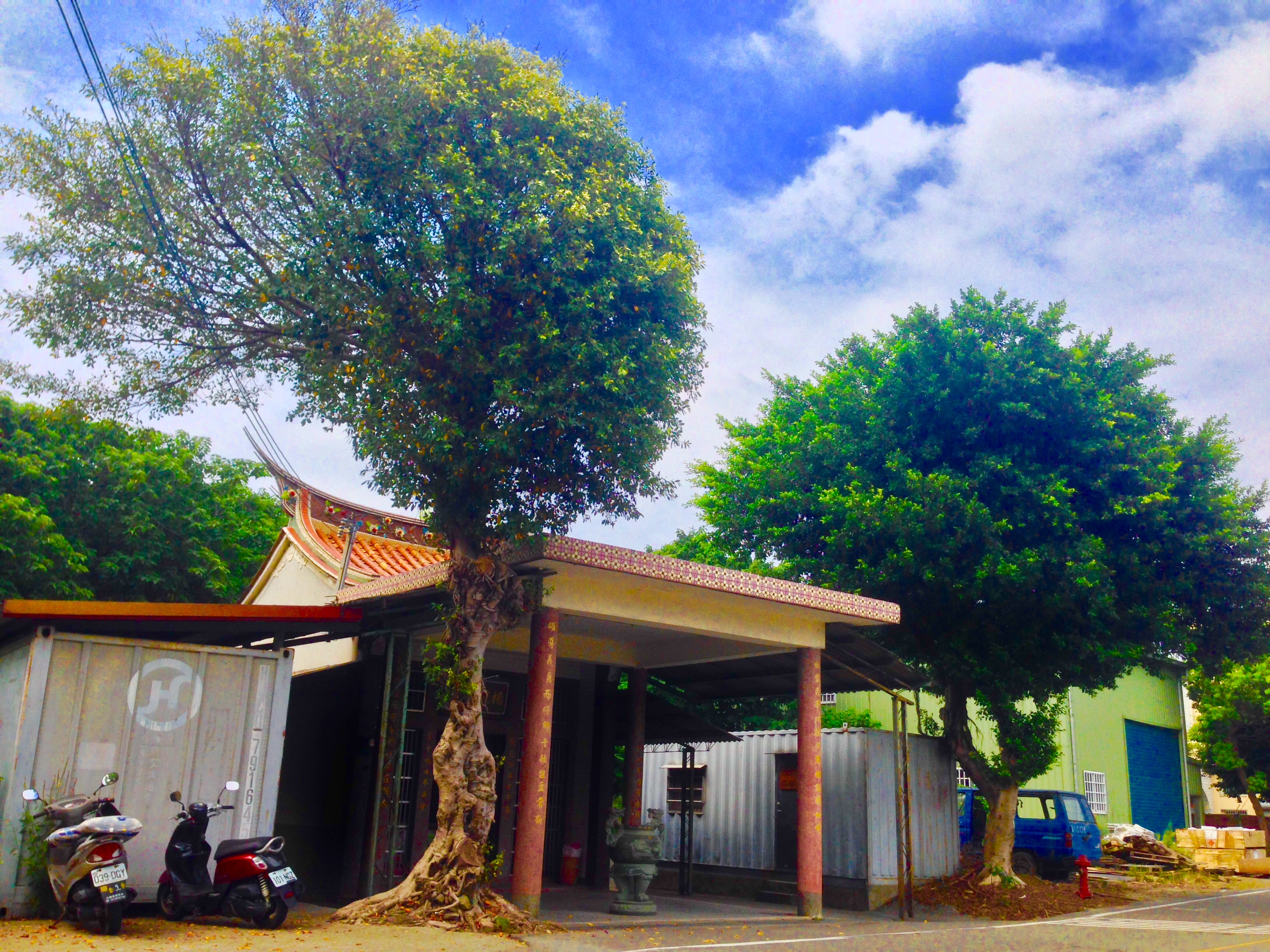 中文（台灣）: 楊統領廟一景